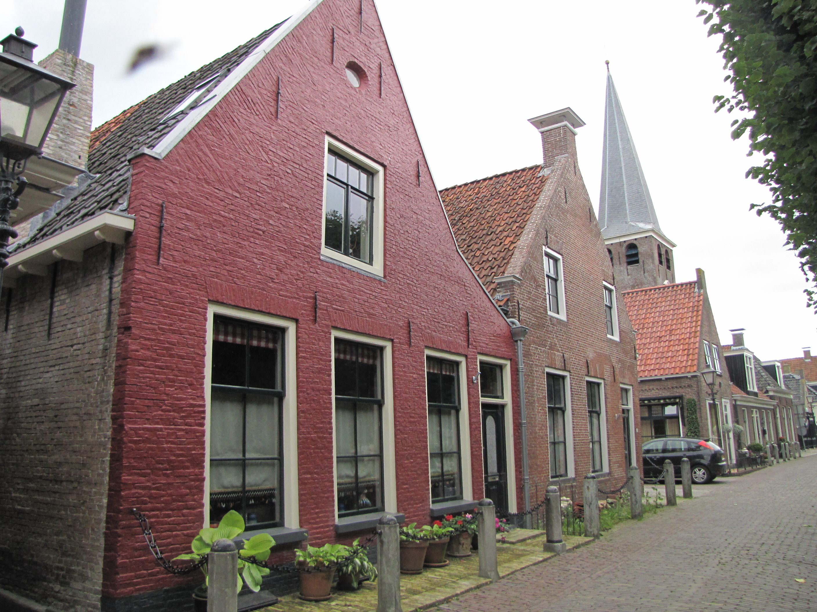 Eegracht 61-60